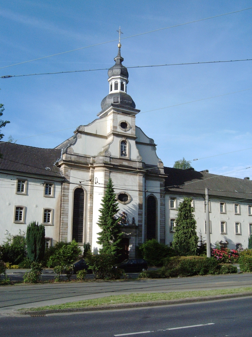 Fürstin-Franziska-Christiane-Stiftung Mittelbau der Stiftung Aufgenommen am 26. Mai 2005 durch Schumir GNU FDL